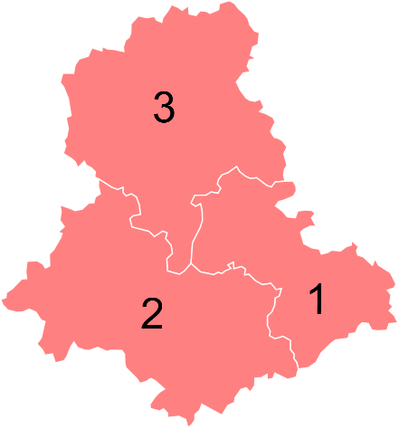 Résultats des élections législatives de la Haute-Vienne en 2012